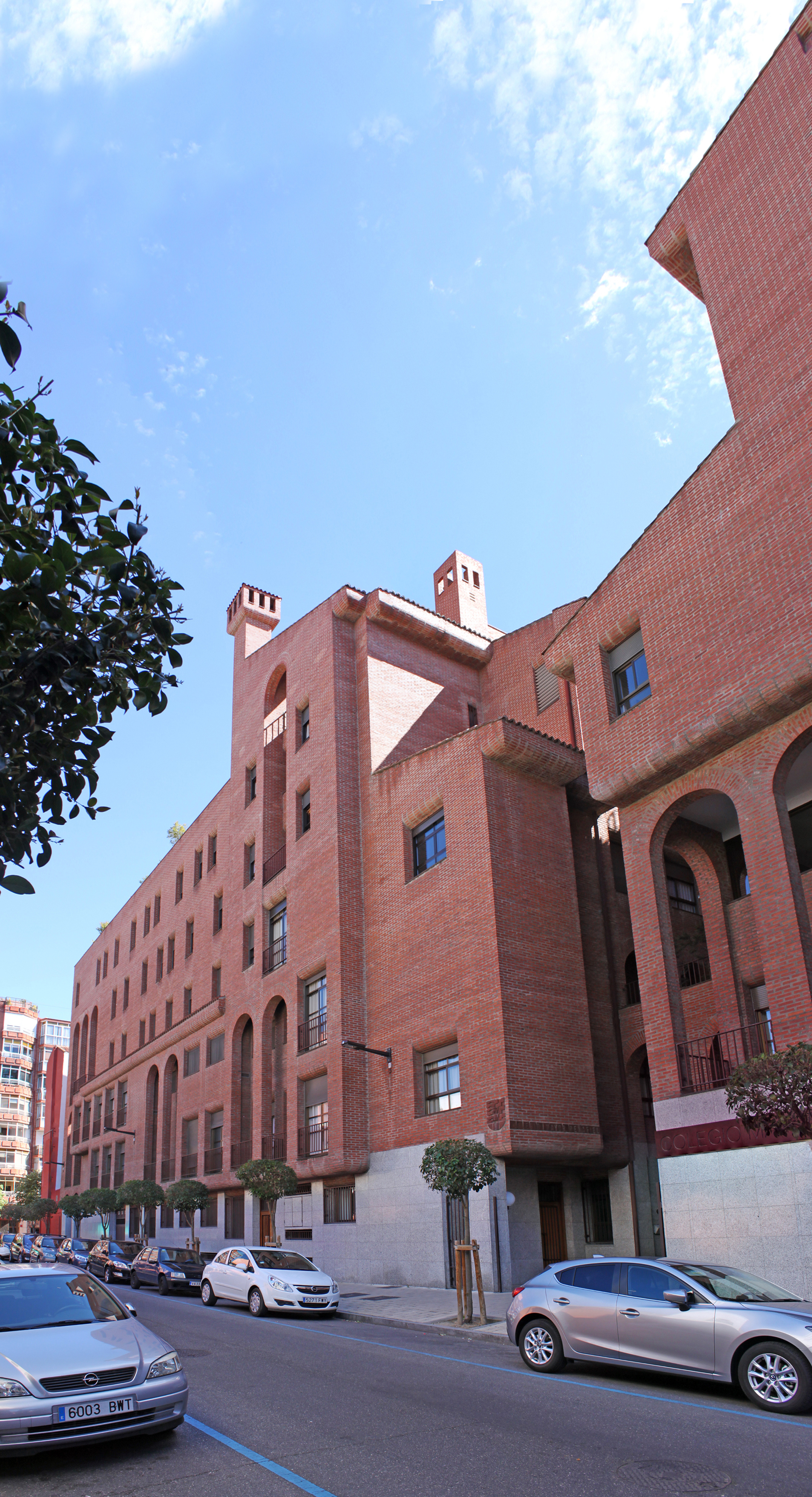 CalleEstudios